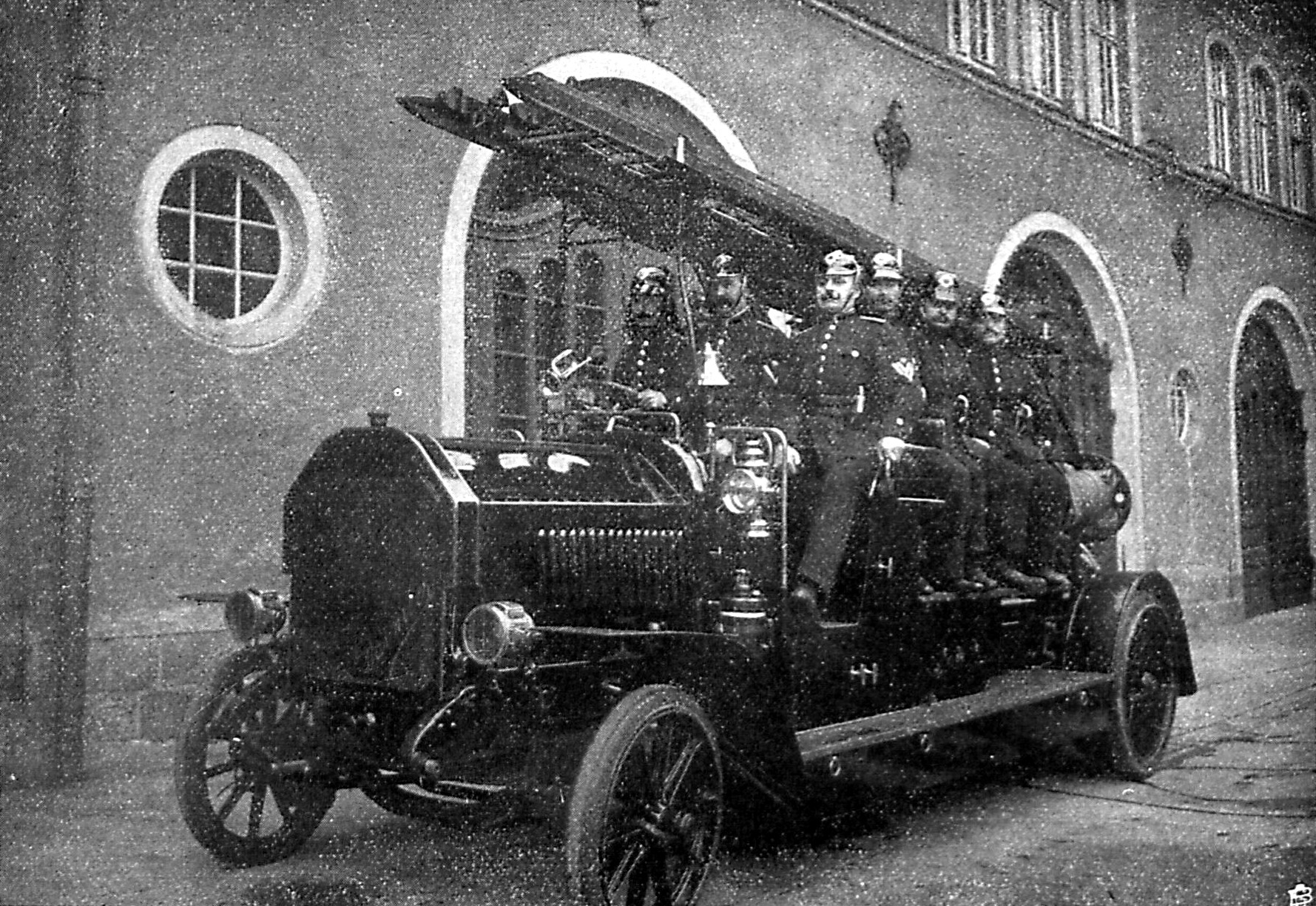 Die neue Automobilspritze der Lübecker Feuerwehr ist bemannt und zur Abfahrt bereit.